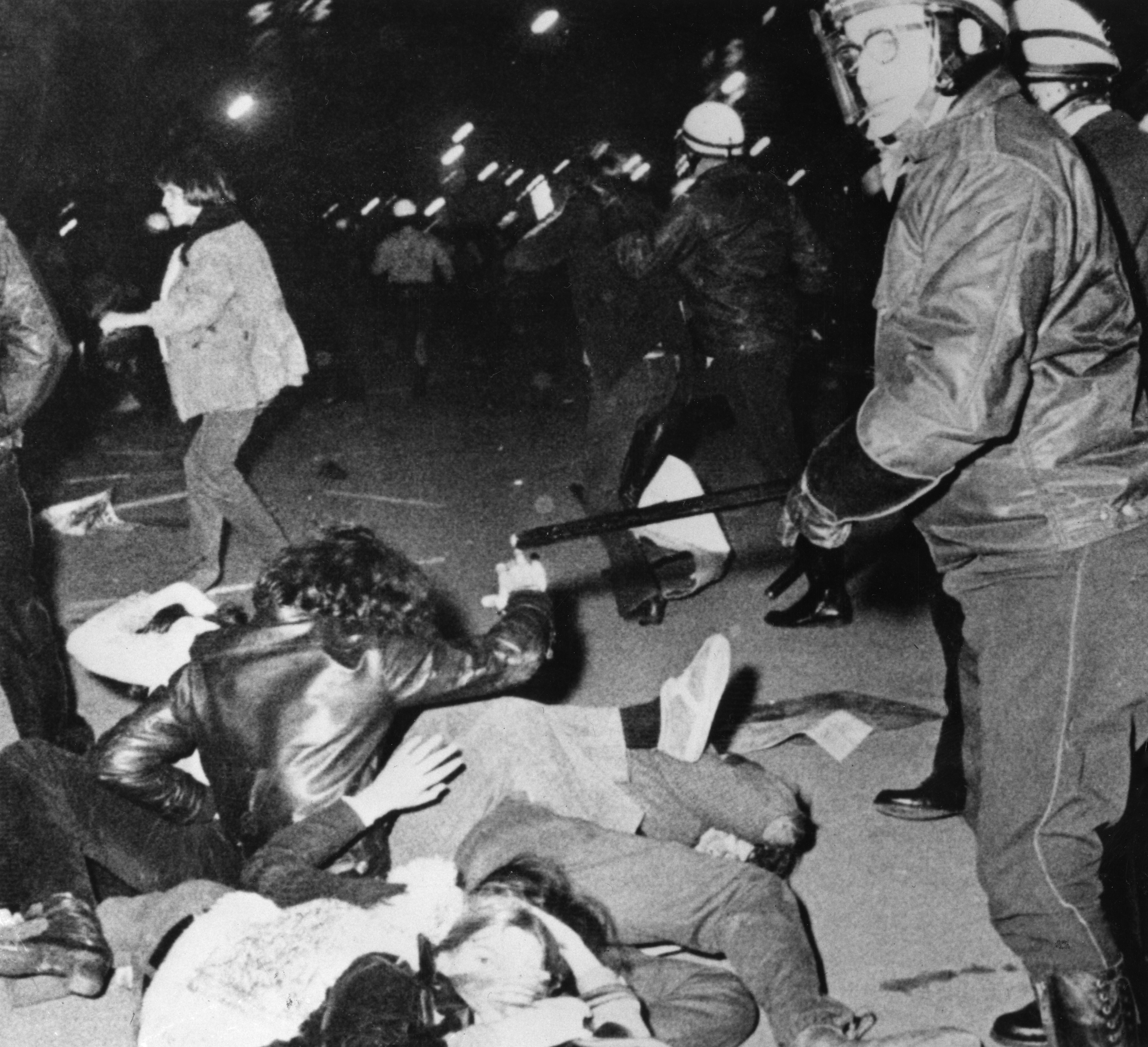 Durant le conflit au journal La Presse en 1971, des policiers ont chargés les manifestants.